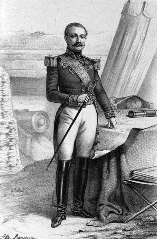 "Oudinot, duc de Reggio, général en chef de l'armée des Alpes et du corps expéditionnaire de la Méditerranée (1848-1849)".